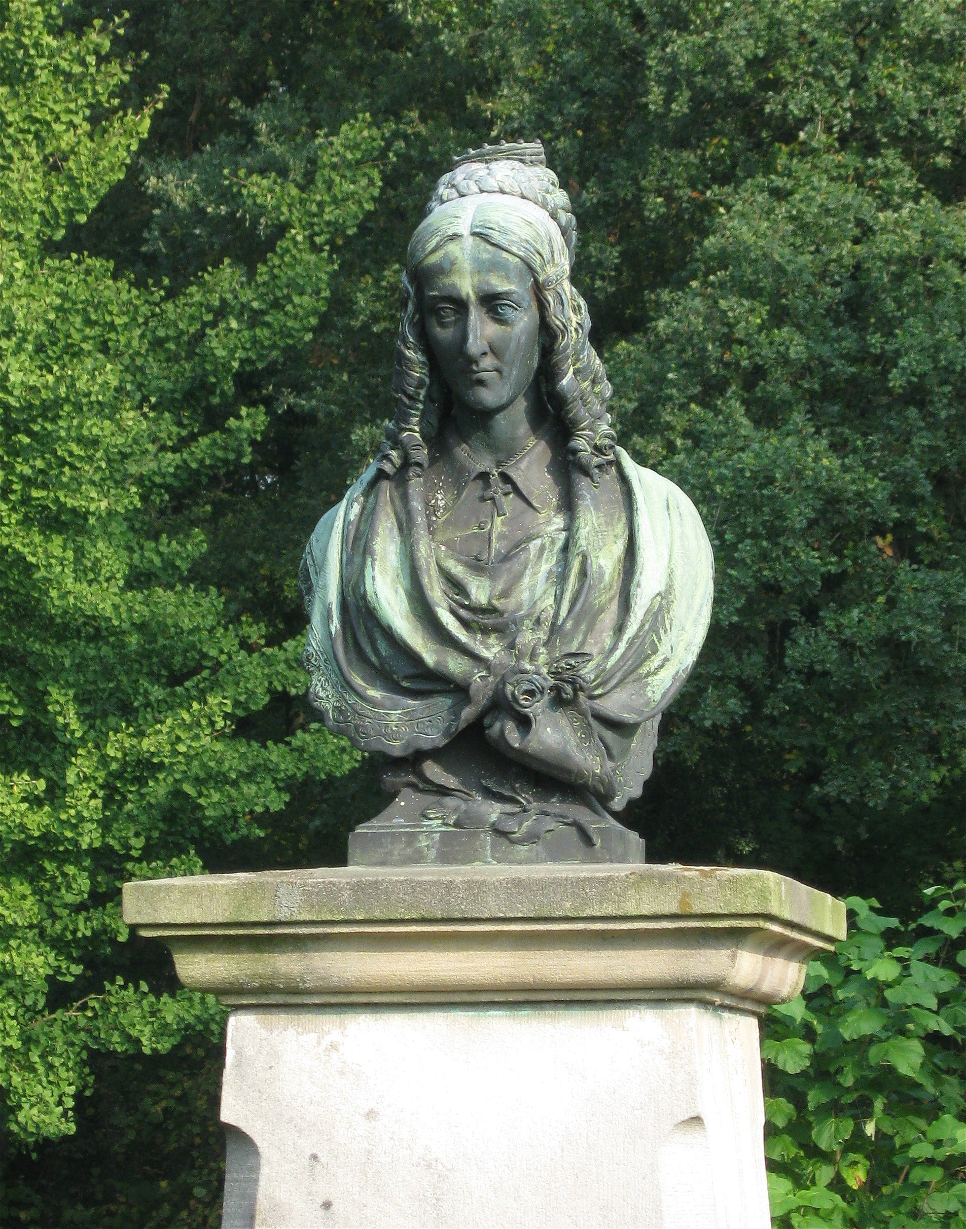 Büste der Annette von Droste-Hülshoff im Park von Burg Hülshoff, Havixbeck